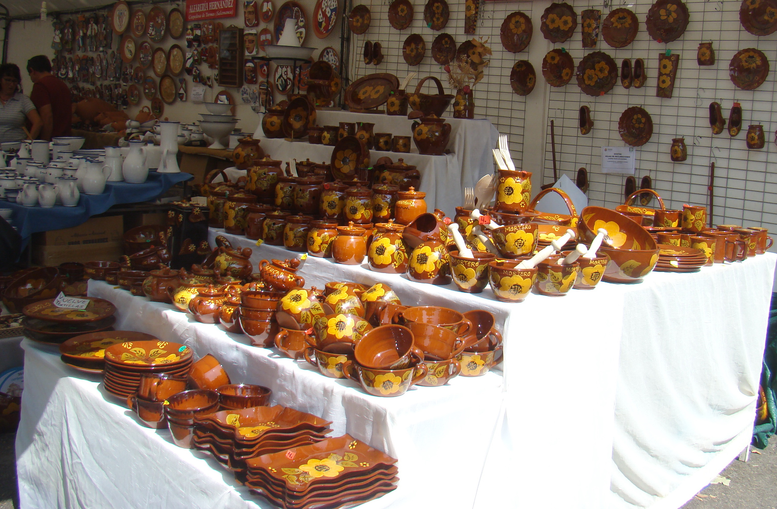 Feria de la Cerámica en el año 2017. Paseo Central del Campo Grande de Valladolid, España. Cerámica de Jiménez de Jamuz, León.